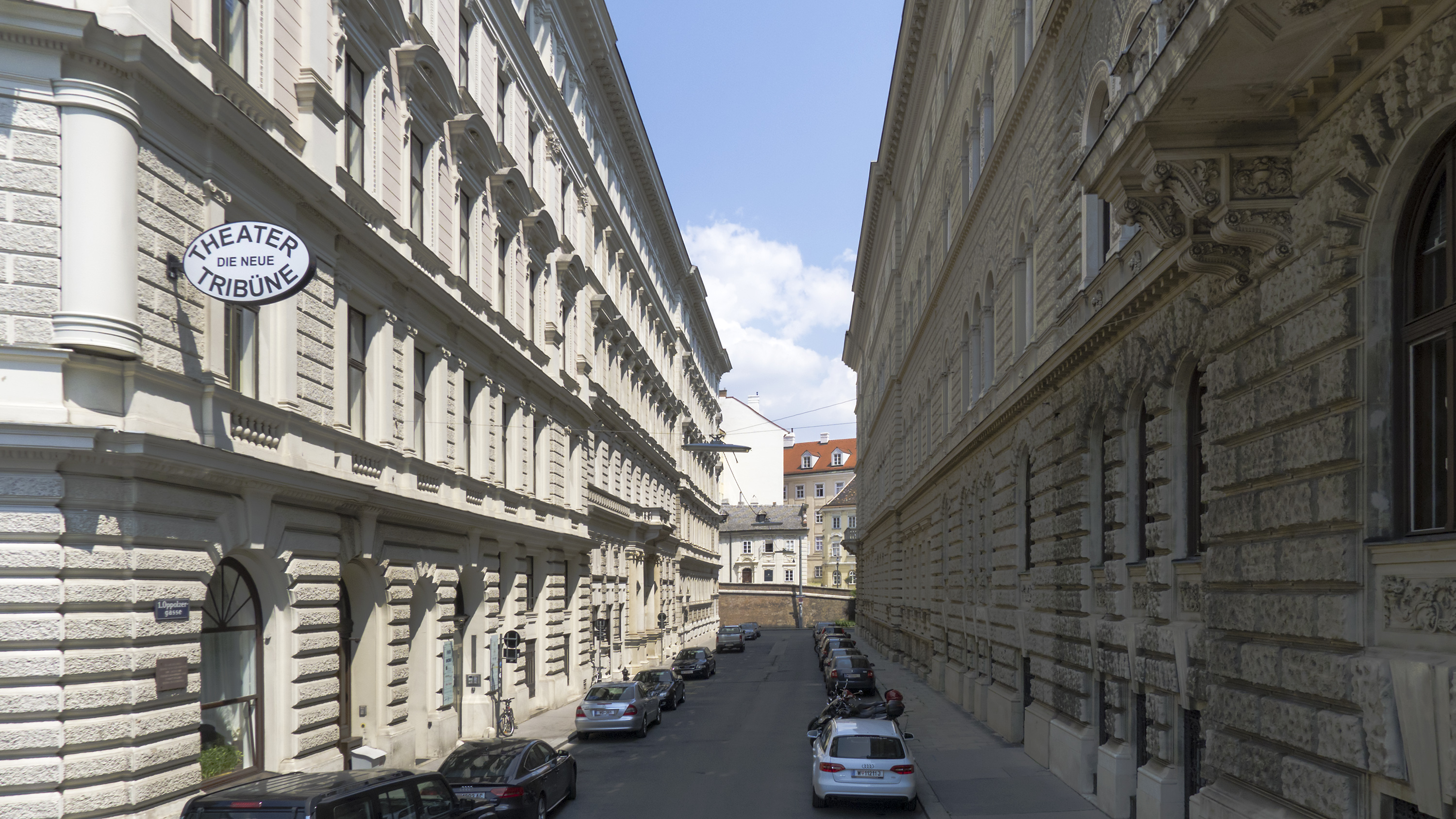 Oppolzergasse in Wien 1 bei der Löwelstraße Richtung Nordosten